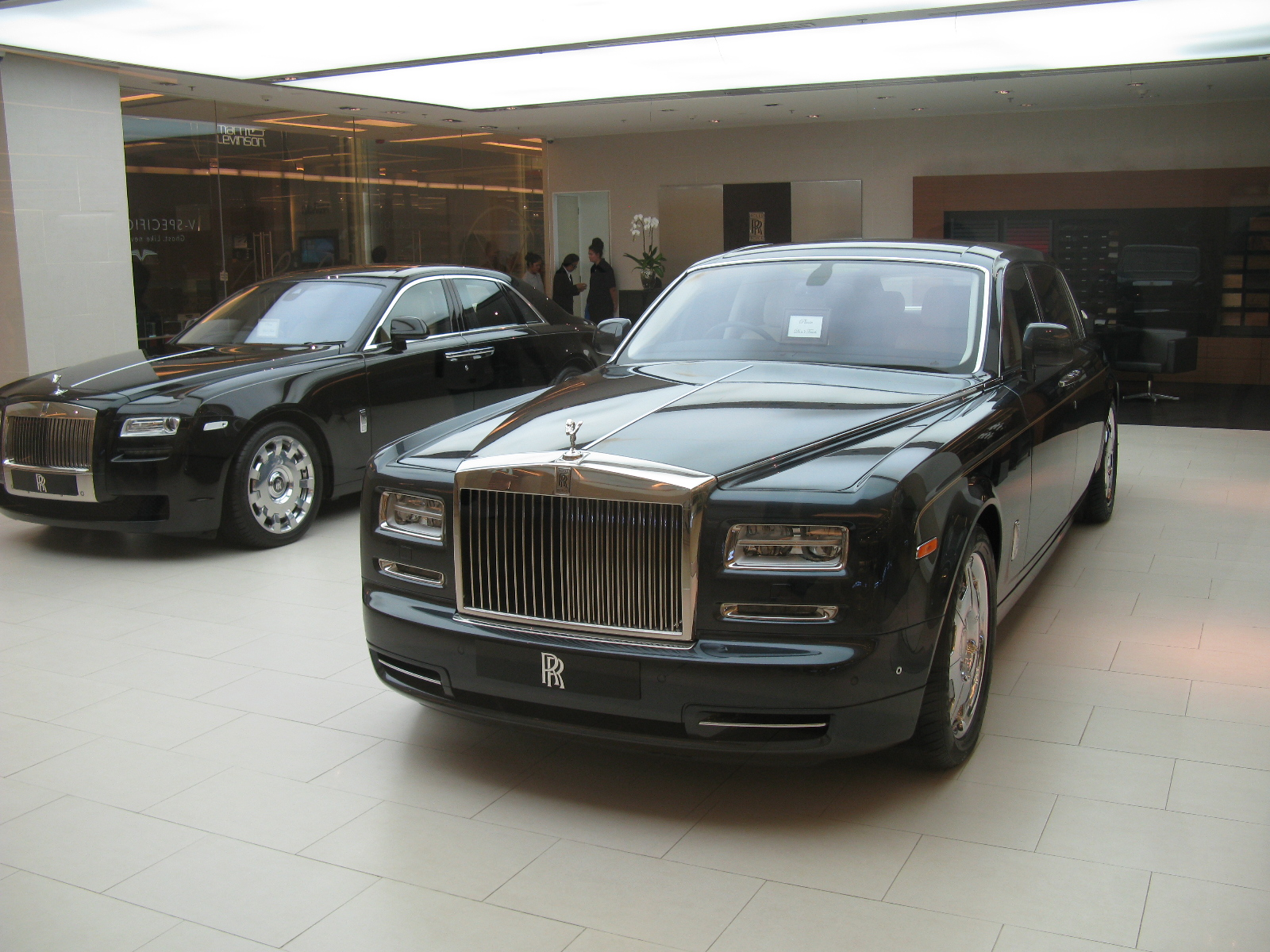 Siam Paragon , Auto Gallery